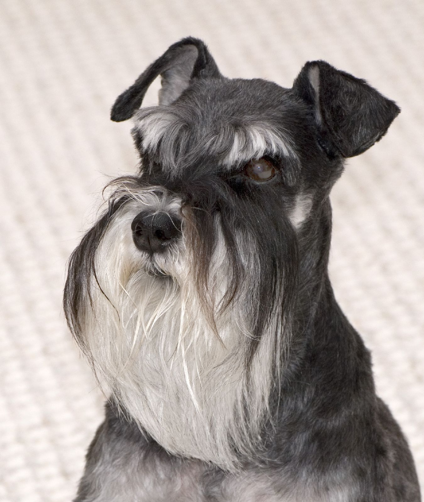 A black-and-silver Miniature Schnauzer named Mattie.